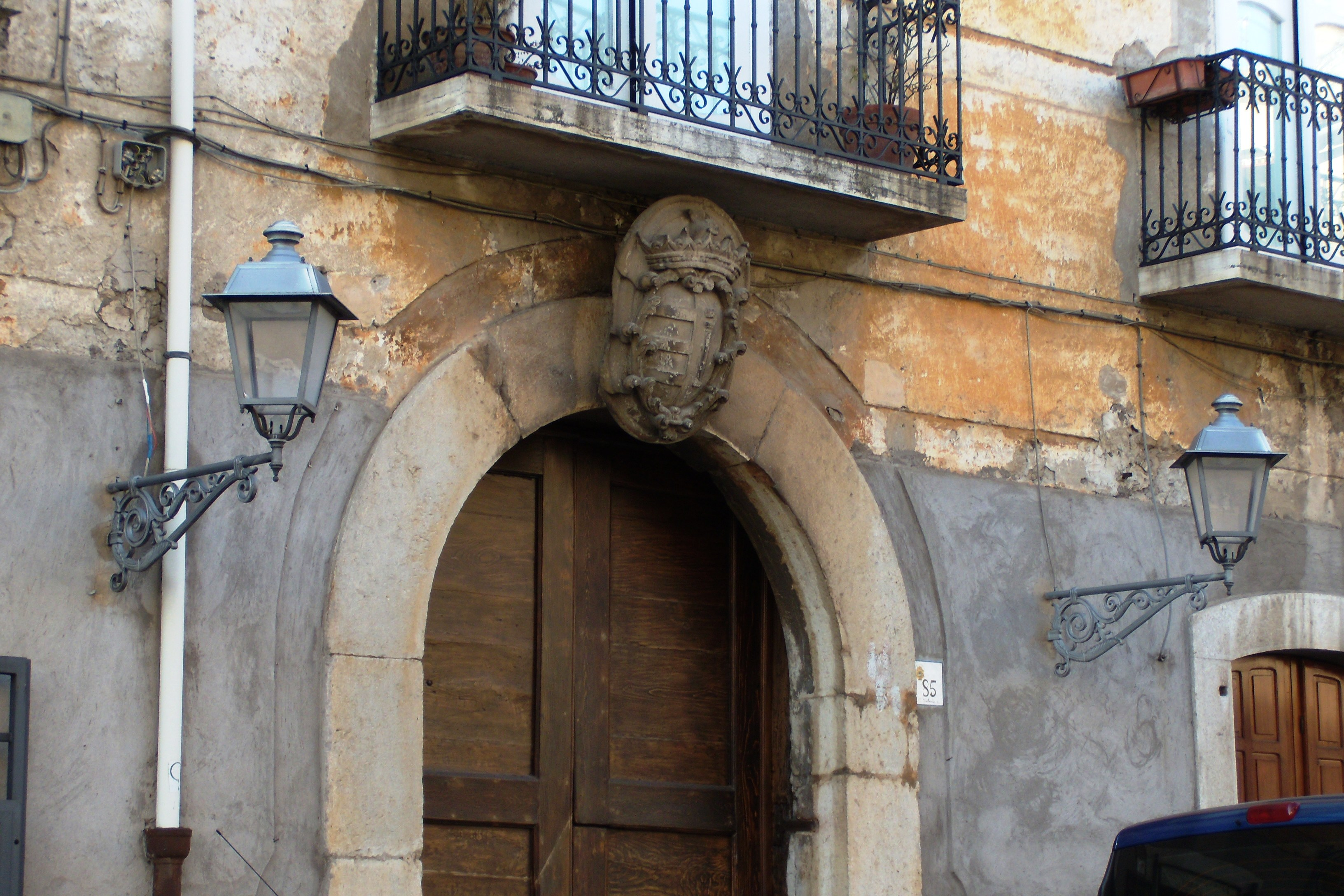 Particolare della facciata della Taverna ducale di Cerreto Sannita.